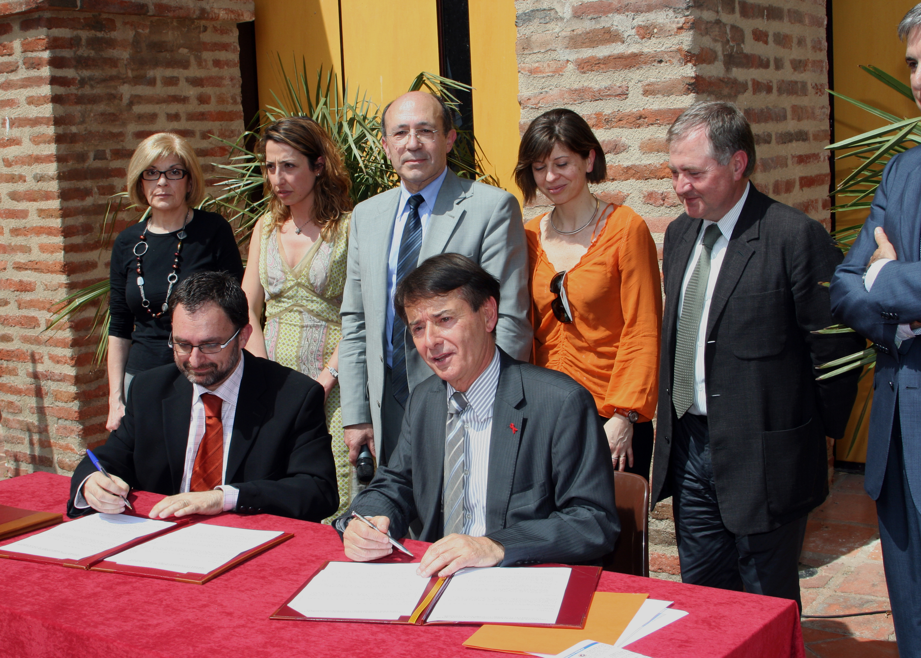 Création de TSF Network (Réseau Eurorégional de Radio et de Télévision Sans Frontières). Perpignan, le 23/05/2008.